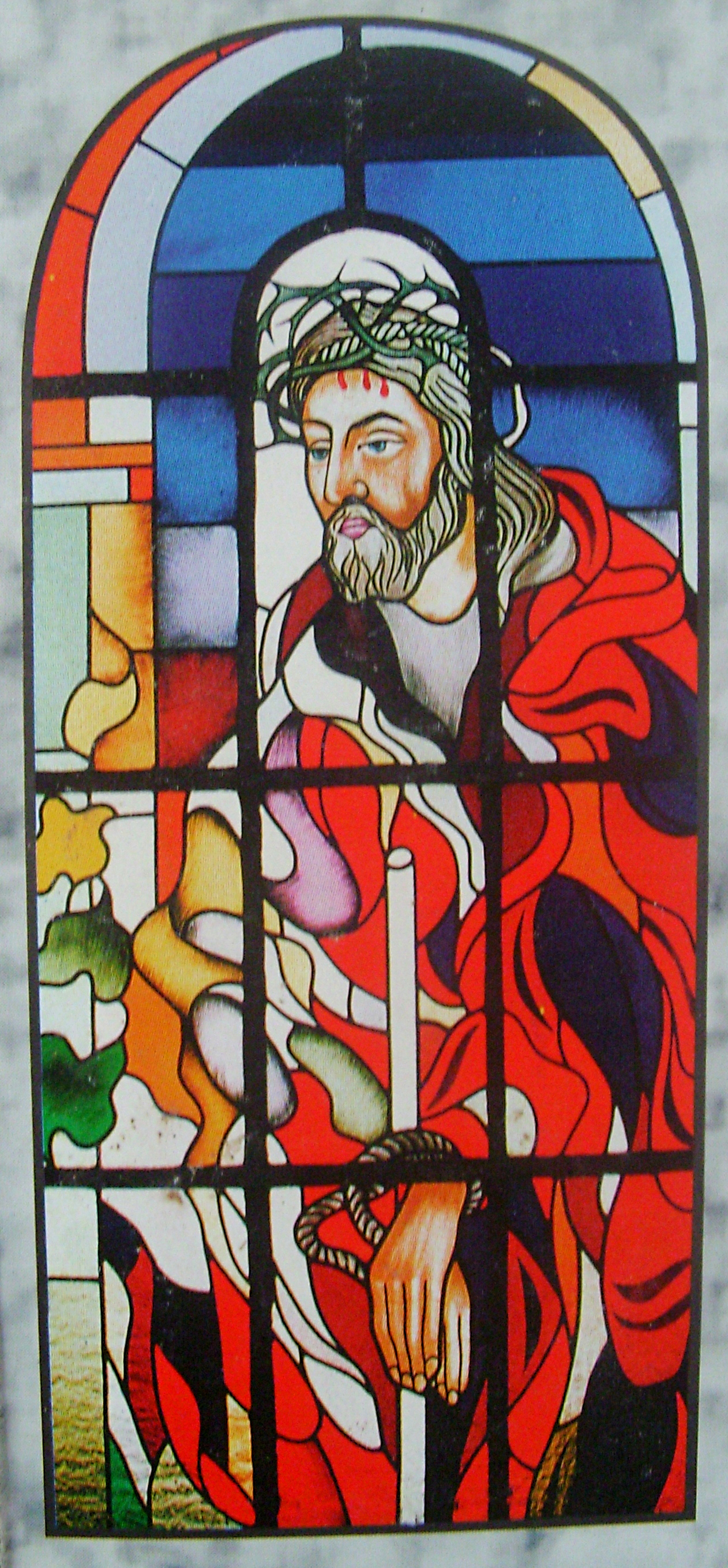 Oto Człowiek - witraż w kościele Imienia Maryi w Bączalu Dolnym (diecezja rzeszowska)